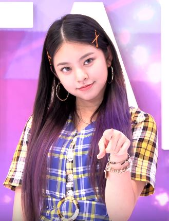 4일 오후 서울 마포구 상암동 tbs 오픈스튜디오에서 ‘tbs 팩트인스타 - ‘체리블렛’편 녹화가 펼쳐져 체리블렛 린린이 포토타임을 갖고 있다.